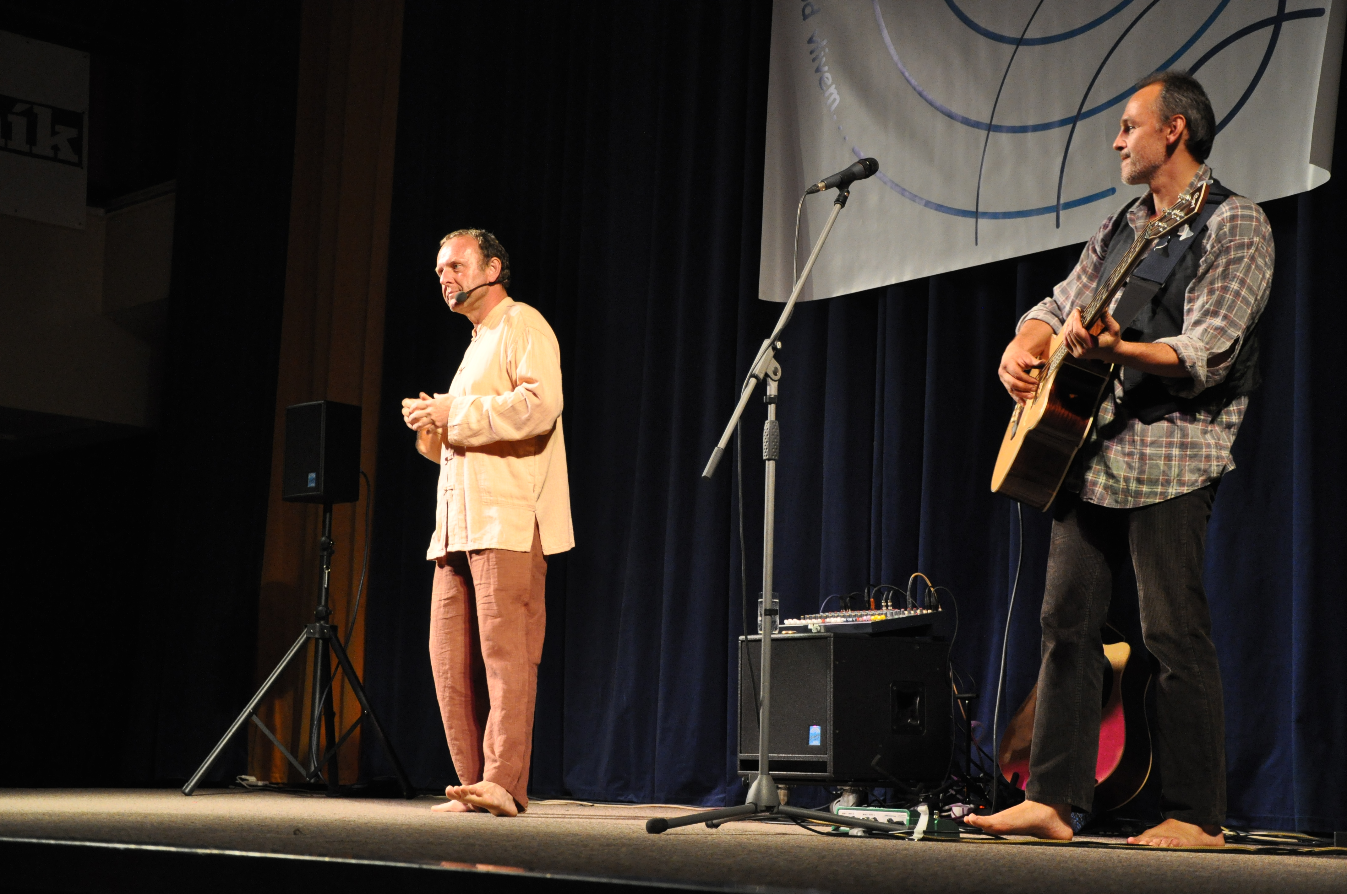 Jaroslav Dušek